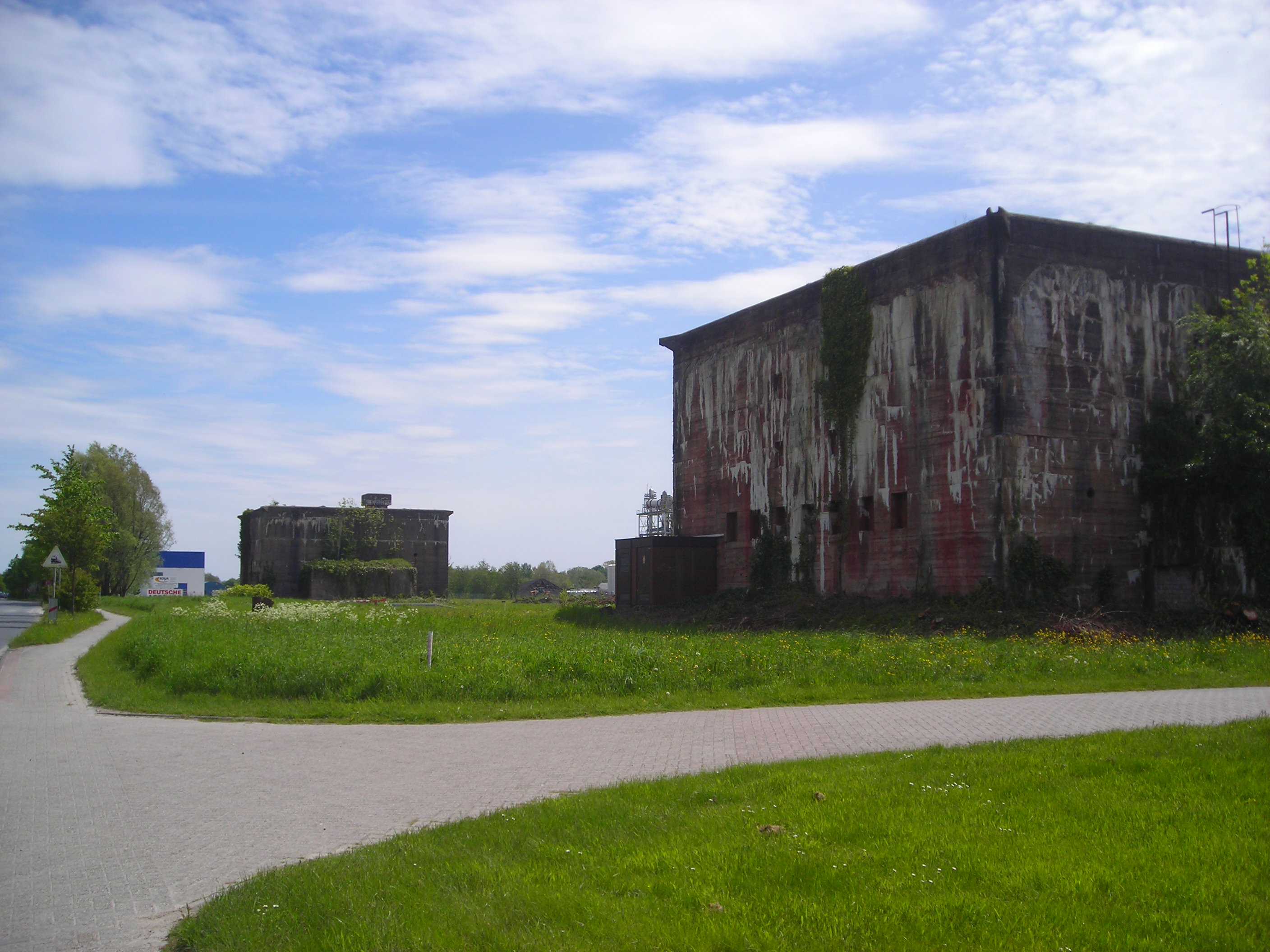 Zwei Mannschaftsbunker der ehemaligen Kriegsmarinewerft Wilhelmshaven. Diese Bunker sollen im Verlauf des Jahres 2012 abgerissen werden